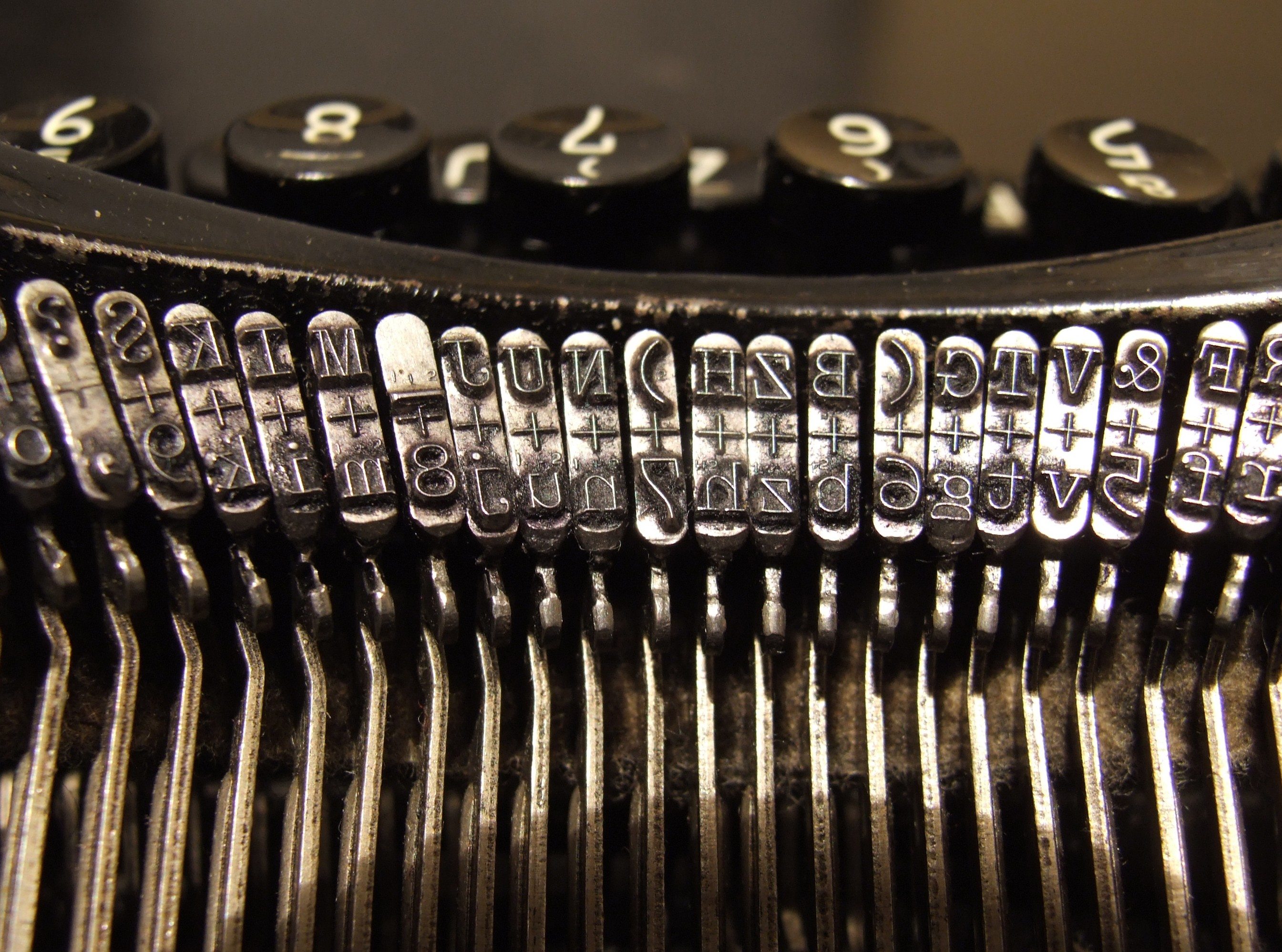 Typewriter typebars